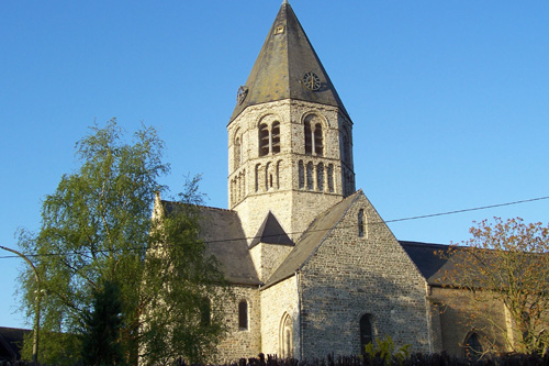 De kerk van Ichtegem Foto gemaakt door Jorgen Deketelaere